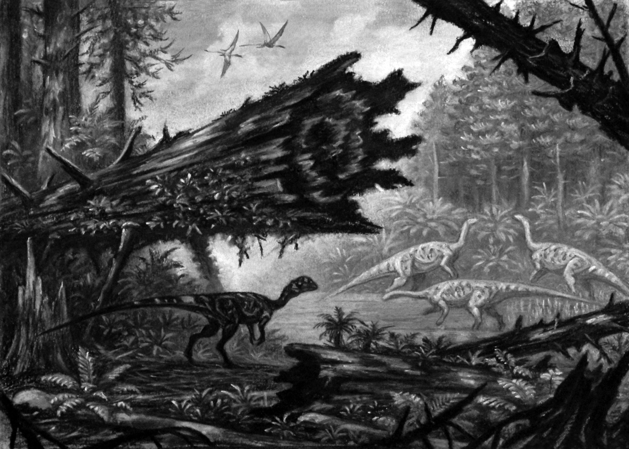 Liliensternus liliensterni.